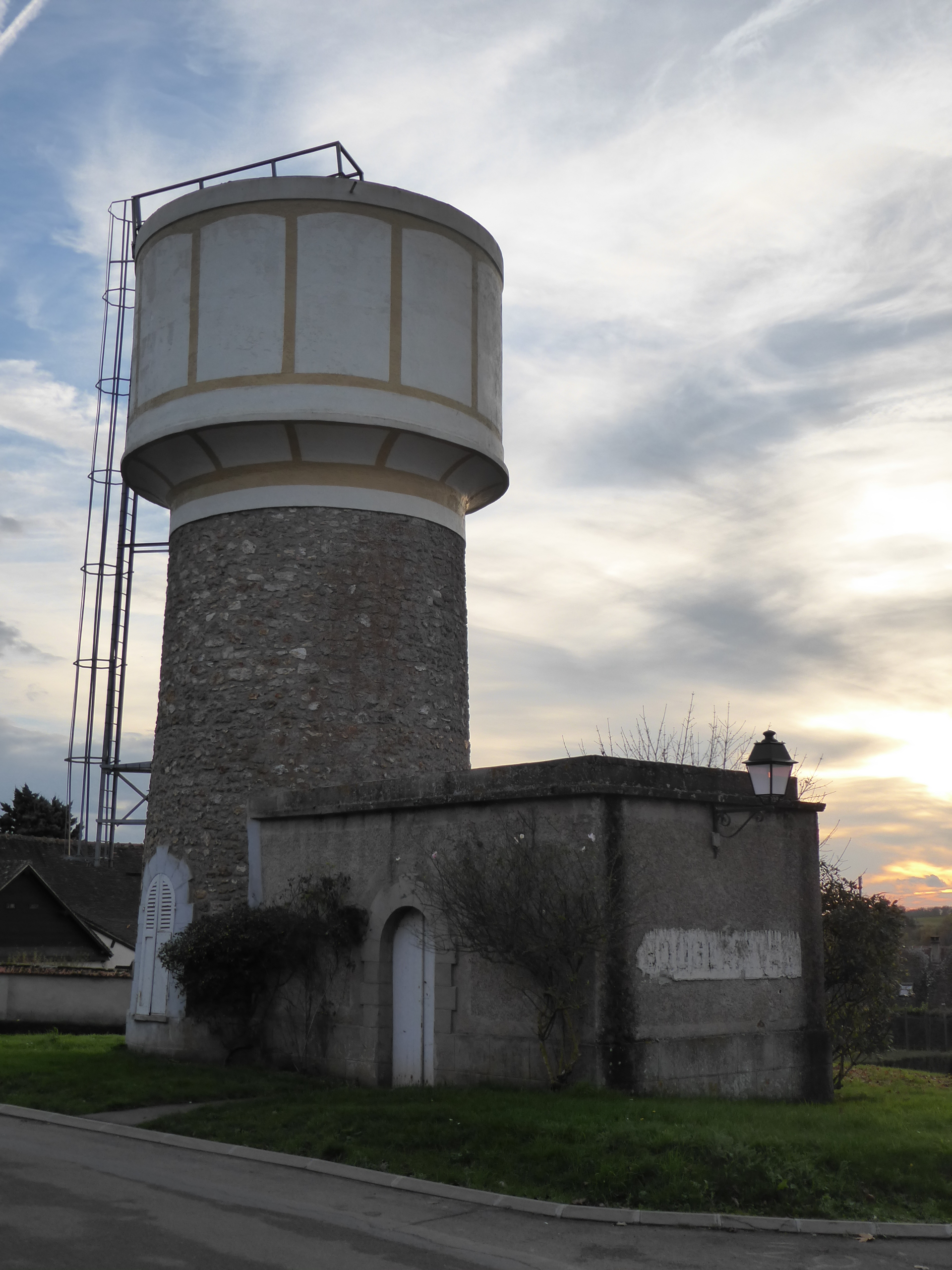 Château d'eau de Bouglainval, Eure-et-Loir (France).